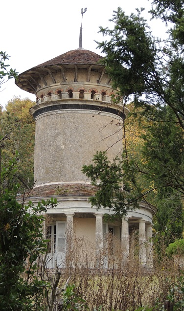 Domaine de la Fosse, pigeonnier-temple du domaine avec une colonnade circulaire autour de la base de la tour présentant des portes-fenêtres dont l'accès est couvert de petites tuiles plates, pas de fenêtre à la tour au 1er étage mais de petites baies à arcades de plein cintre sous la charpente de la poivrière très aplatie sur ses corbeaux apparents